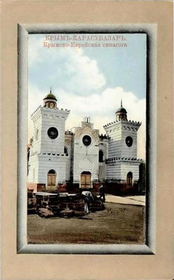 Синагога в Белогорске.